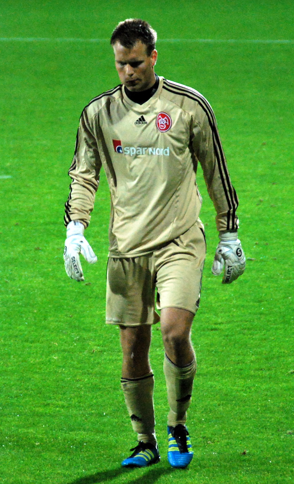 Fodboldspilleren Nicolai Larsen fra AaB. Her under straffesparkskonkurrencen i pokalkampen imellem Viborg FF og AaB på Viborg Stadion.